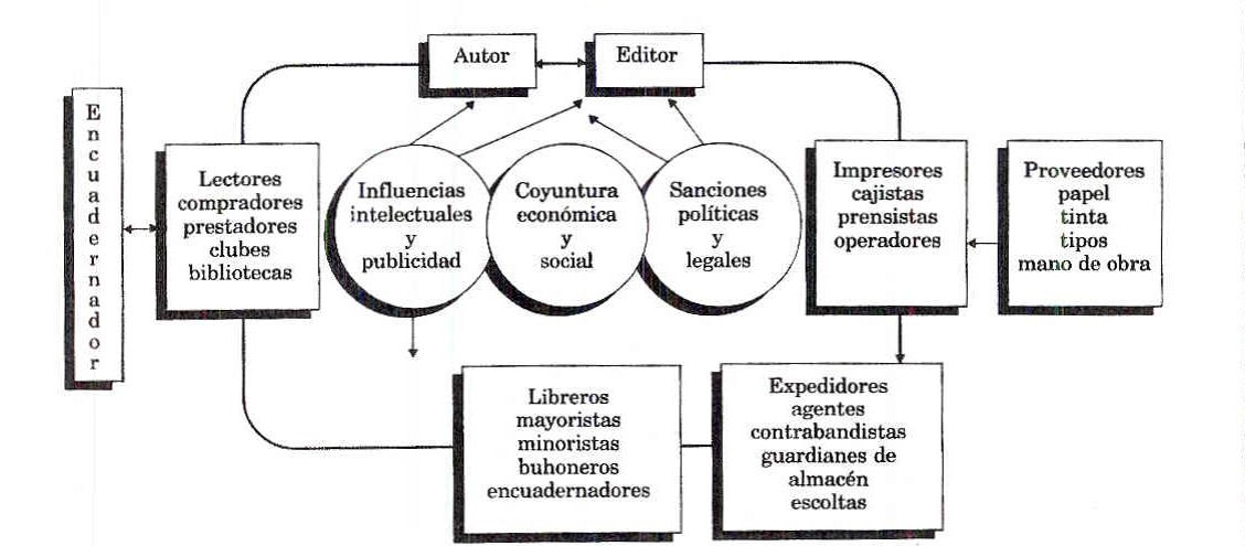 Propuesta para el estudio del libro impreso. Según Robert Darnton debe ser la unión de todo el proceso de difusión.